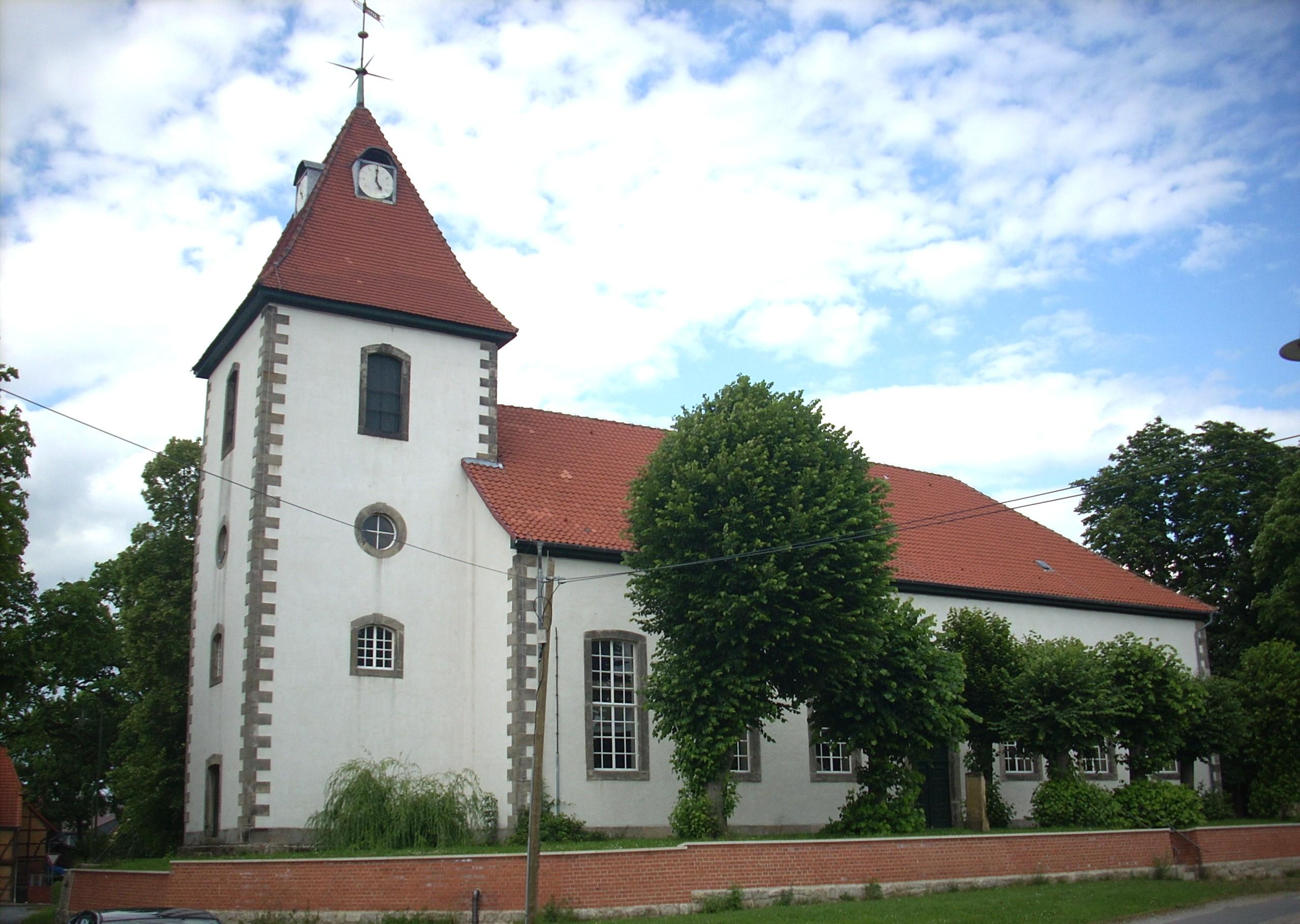 Ev.-luth. Kirche St. Ulrich, Haimar, Sehnde (Germany)